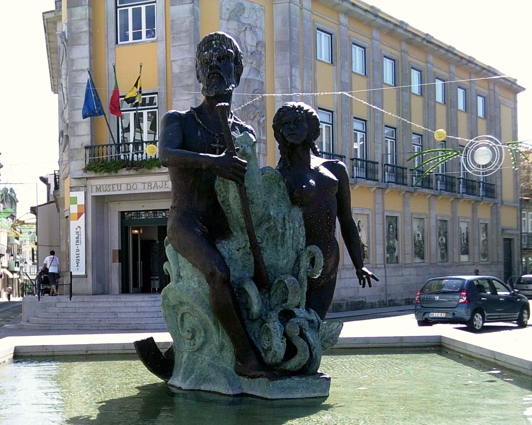 Caramuru e Paraguaçu, cidade,concelho e distrito de Viana do Castelo, Portugal. Ao fundo, o edifício do Museu do Traje.